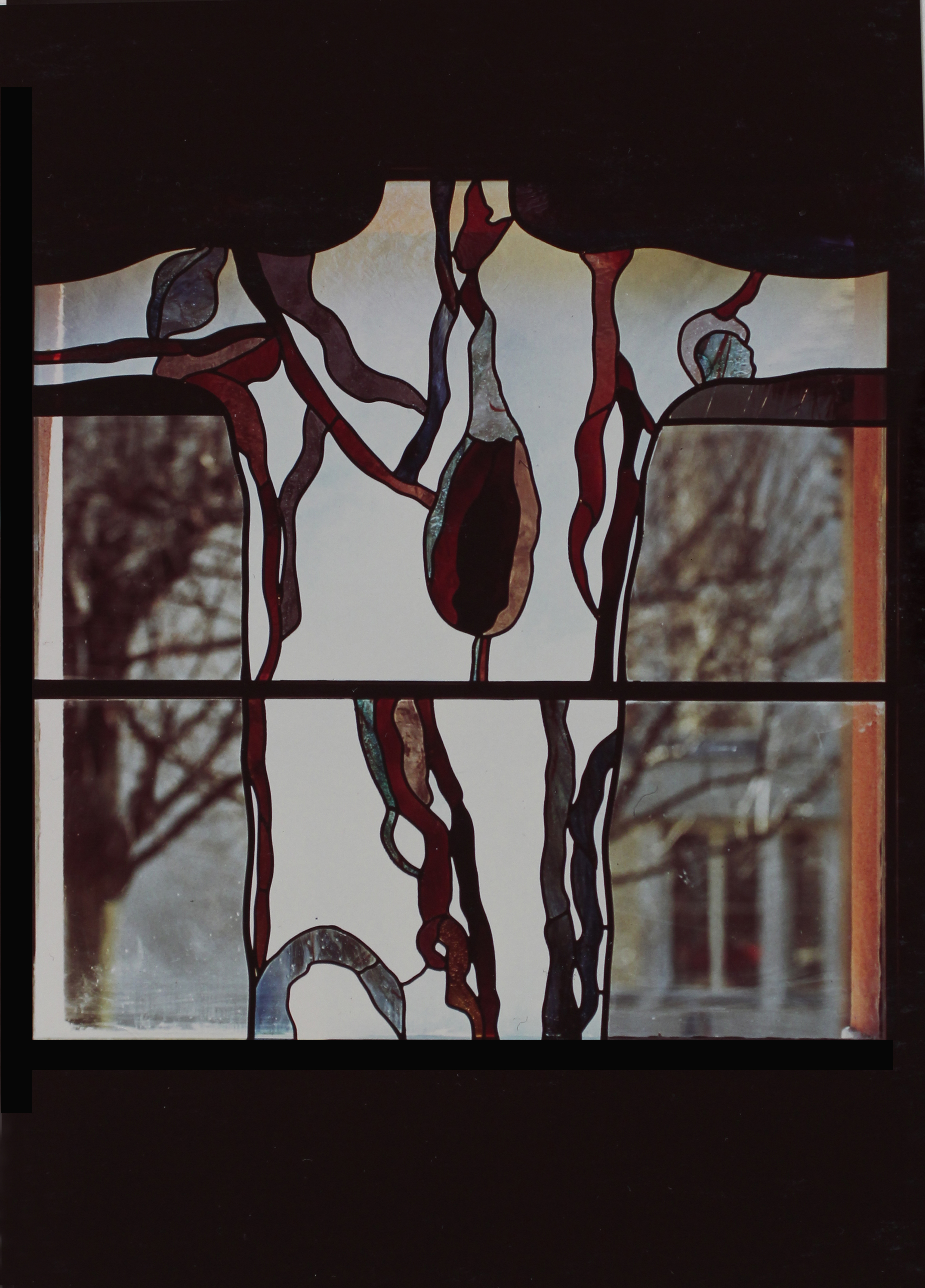 Römisch-katholische Pfarrkirche St. Franziskus Zürich-Wollishofen, Glasfenster von Max Rüedi